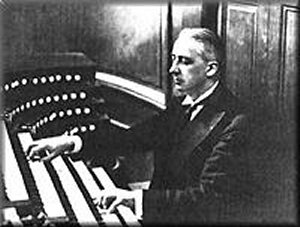 Марсель Дюпре